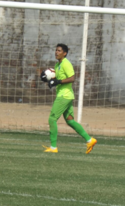 Portero de fútbol